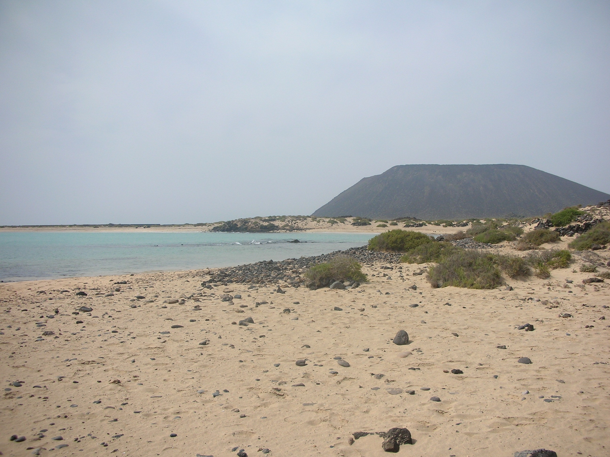 La Graciosa Island, Lanzarote. Playa de la Concha, looking to Punta Saladero